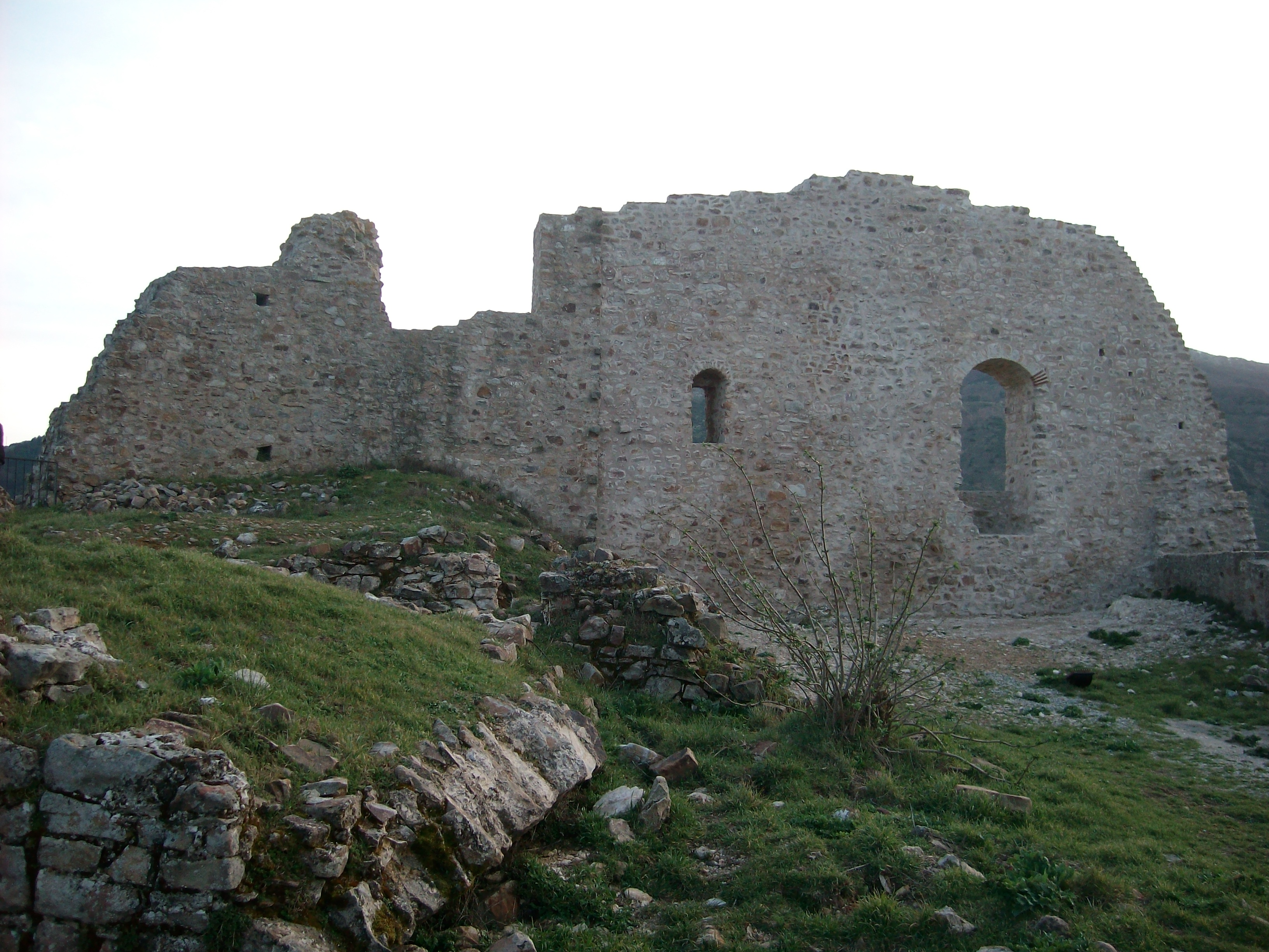 I ruderi del castello dei Ventimiglia, Geraci Siculo (Pa)